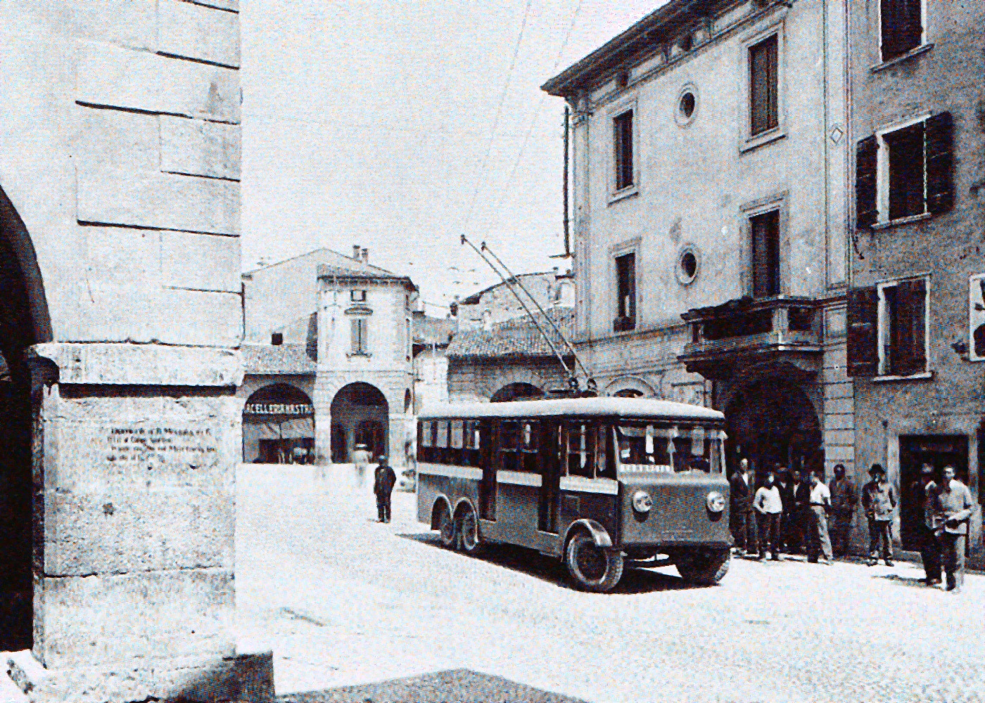 Un filobus FEDRA lascia piazza Malvezzi per impegnare il tratto di linea diretto alla stazione ferroviaria